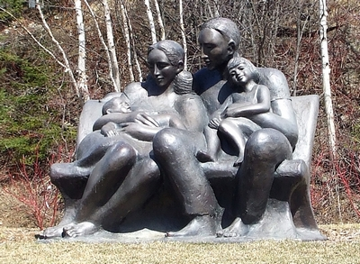 Sculpture de Roger Langevin en 2007 pour Sainte-Blandine de Rimouski. Pour les 125 ans d’existence du village.